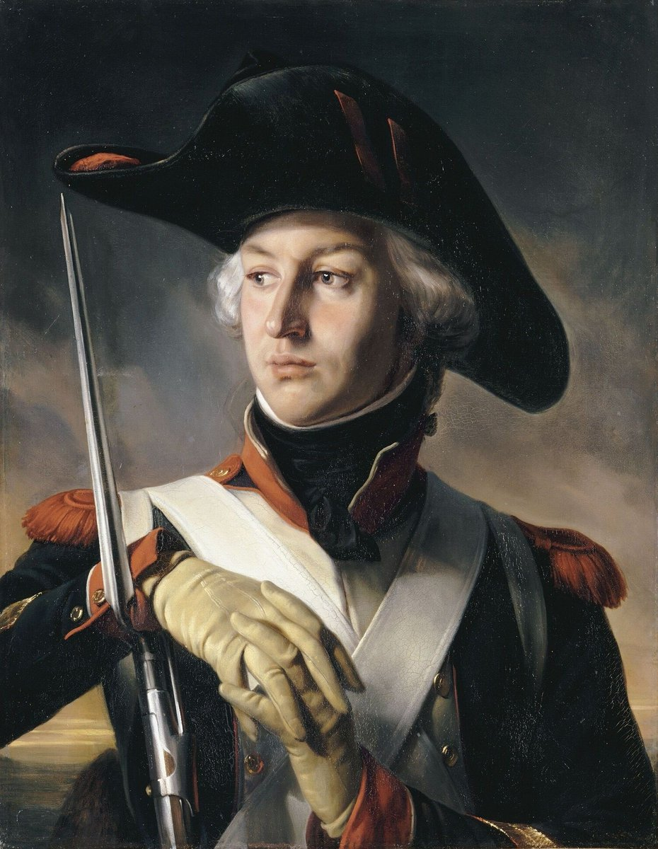 En uniforme de sergent de grenadiers au deŭième bataillon de la Côte d'Or en 1792